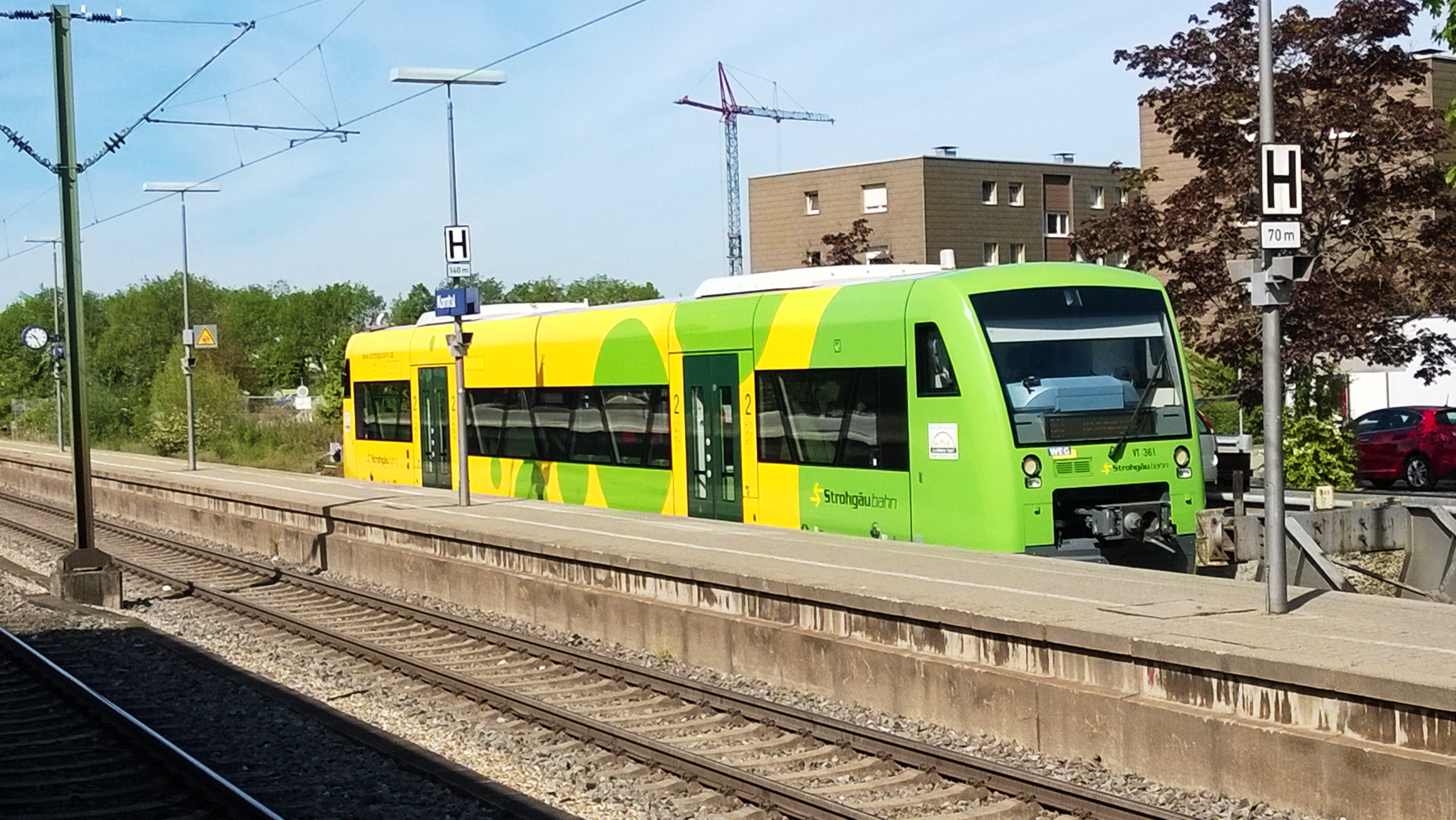 Korntal-Strohgäubahn- Mai 2015